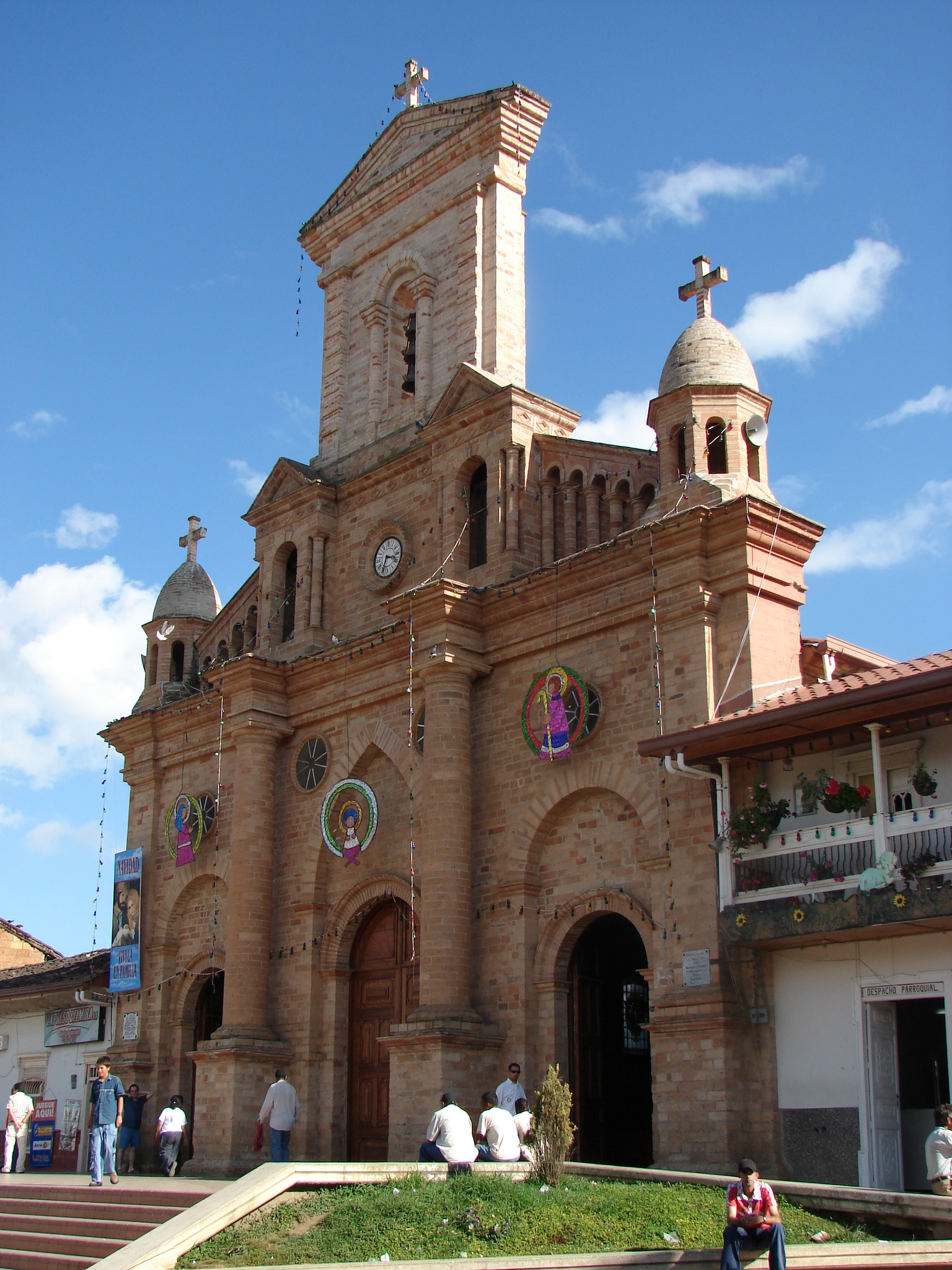 Fachada de la Iglesia de Nuestra Señora de los Dolores, Entrerríos, Antioquia, Colombia.